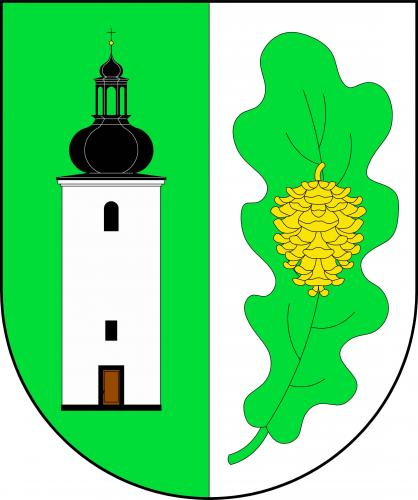 znak, Licibořice, okres Chrudim